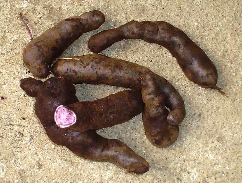 Tubérculos de papas (Solanum tuberosum subsp. tuberosum) de la variedad Guadacho, originaria de Chiloé.